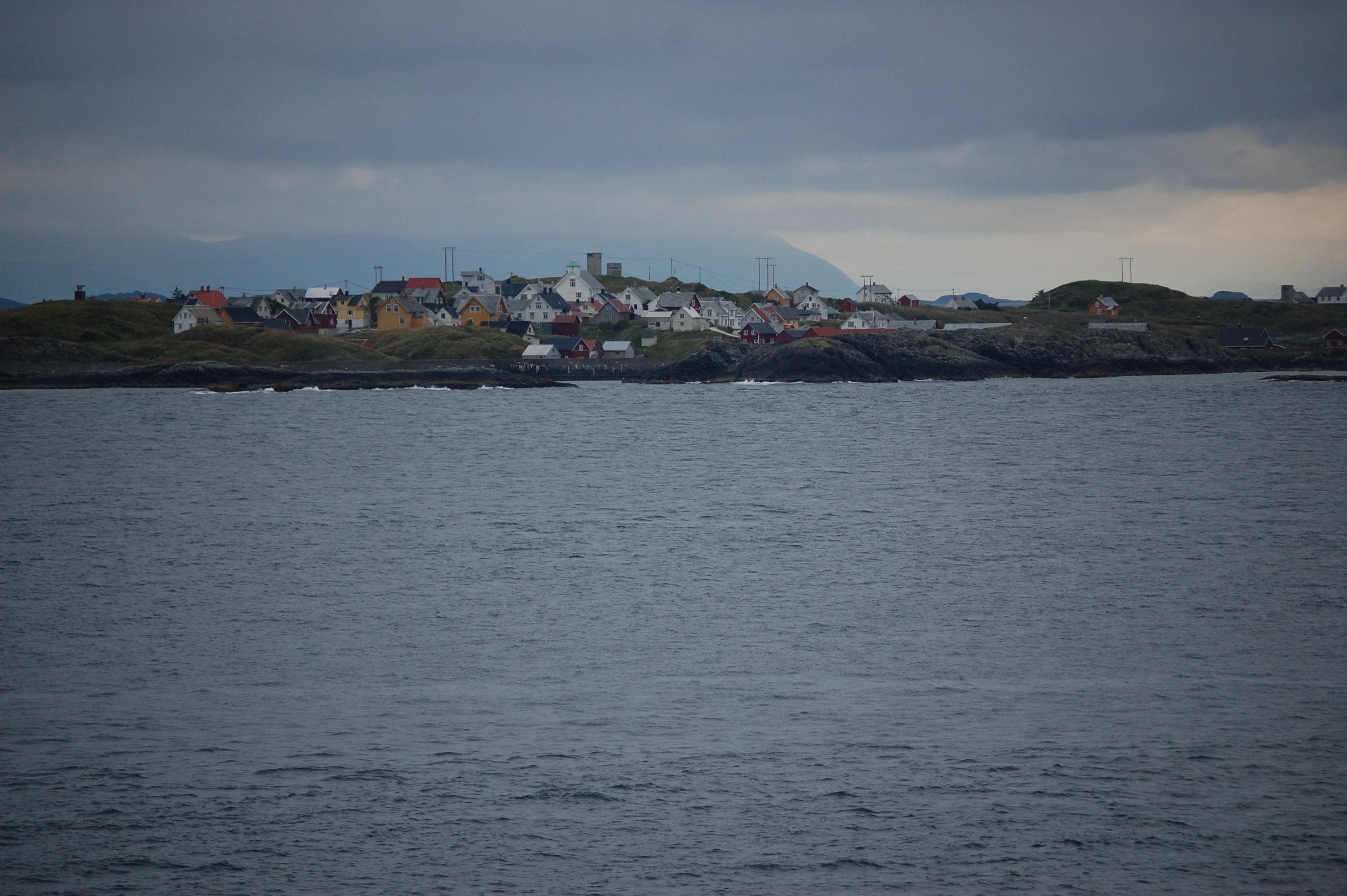 Bjørnsund i Fræna kommune